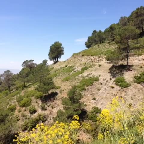 Sierras de Tejeda, Almijara y Alhama Natural Park